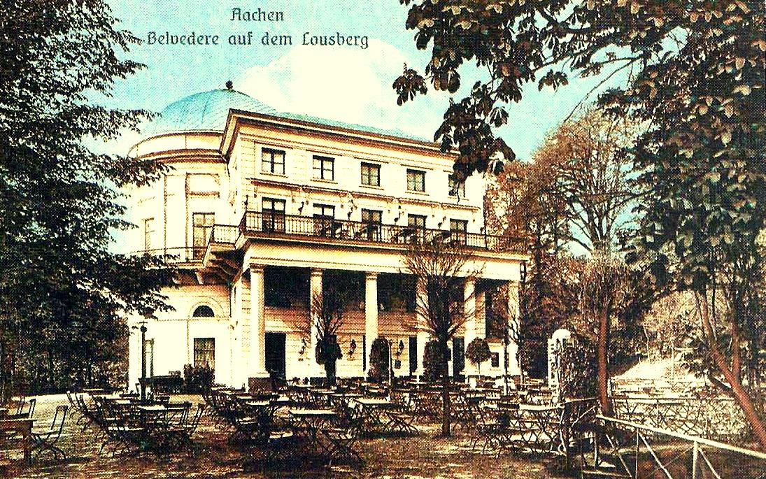 Restaurant Belvedere auf dem Lousberg in Aachen um 1900